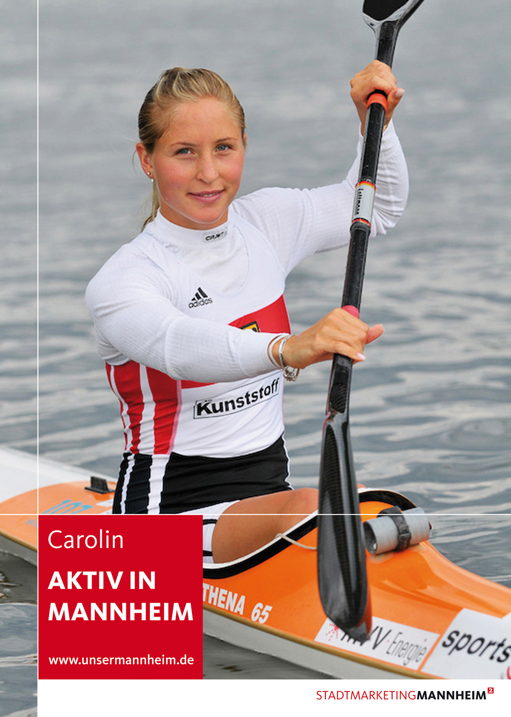 Carolin Leonhardt